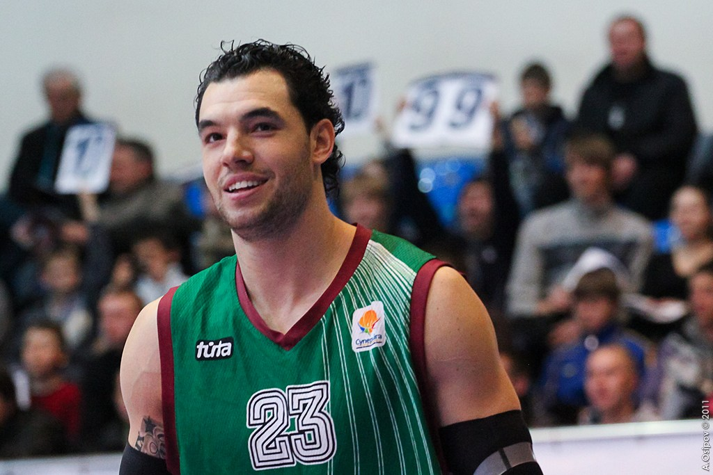 Кристиан Бёрнс / Christian Burns